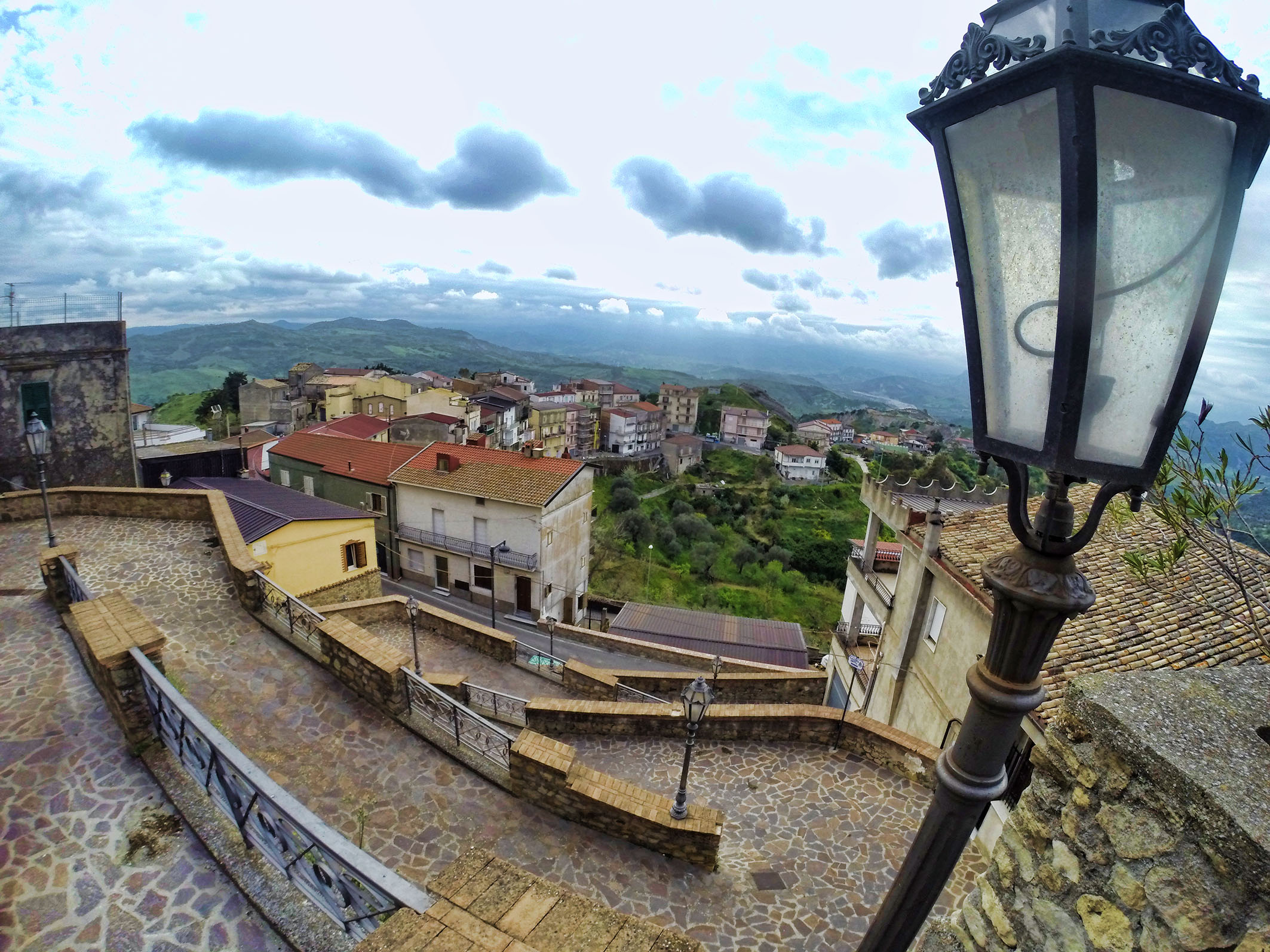 Strada Lamanna This is a photo of a monument which is part of cultural heritage of Italy.